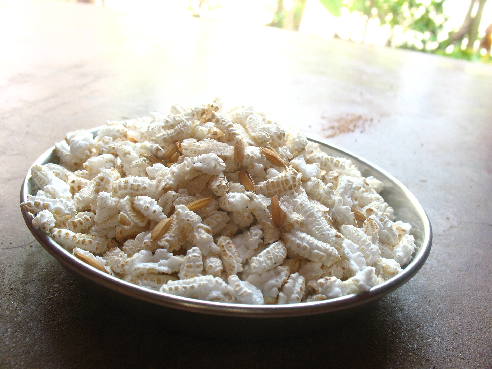 നെല്ല് ചൂടാക്കുമ്പോൾ ലഭിക്കുന്നത്. സ്വന്തം വീട്ടിൽ നിന്നും..